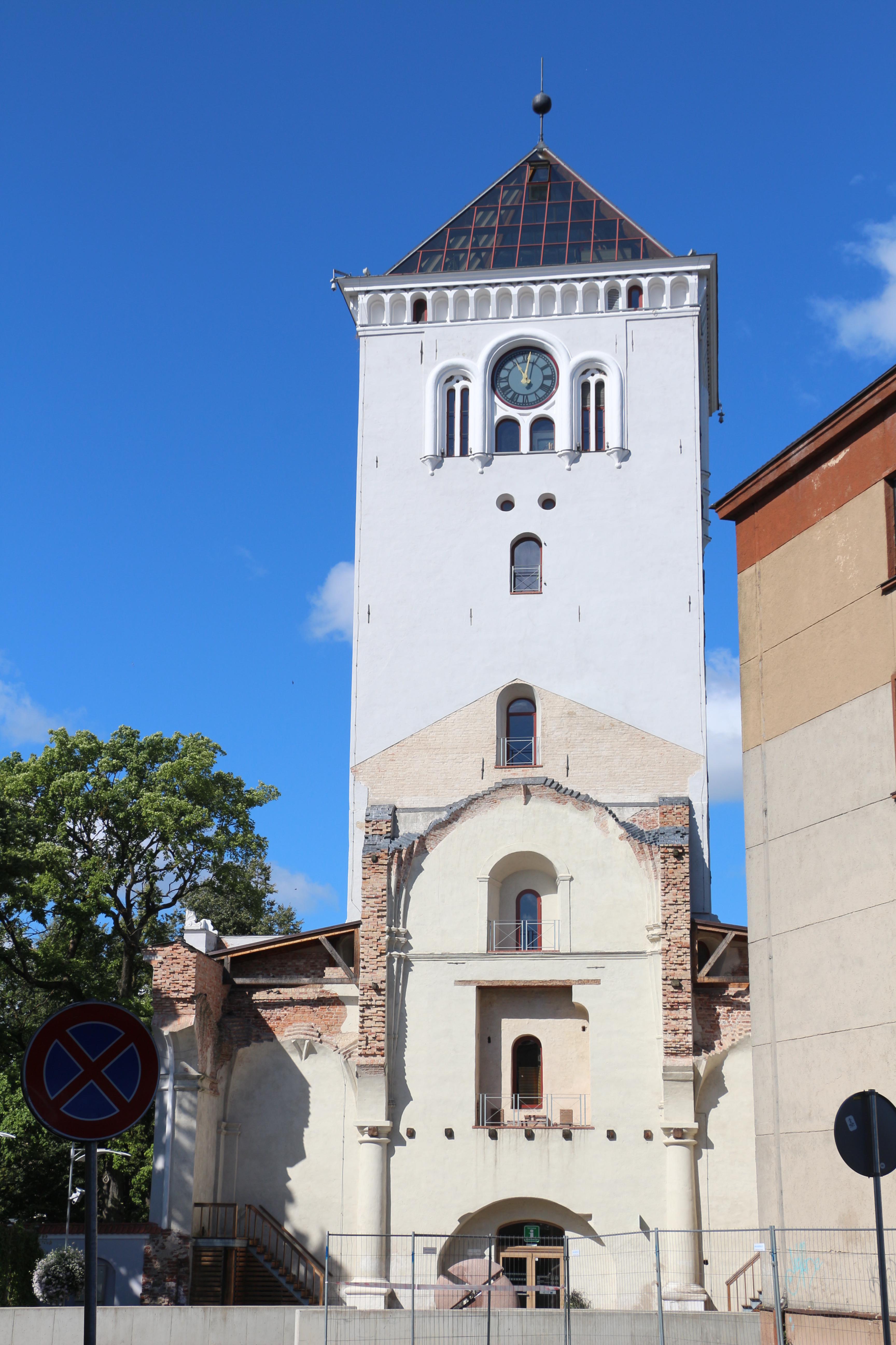 Turm der Trinitatiskirche in Jelgava